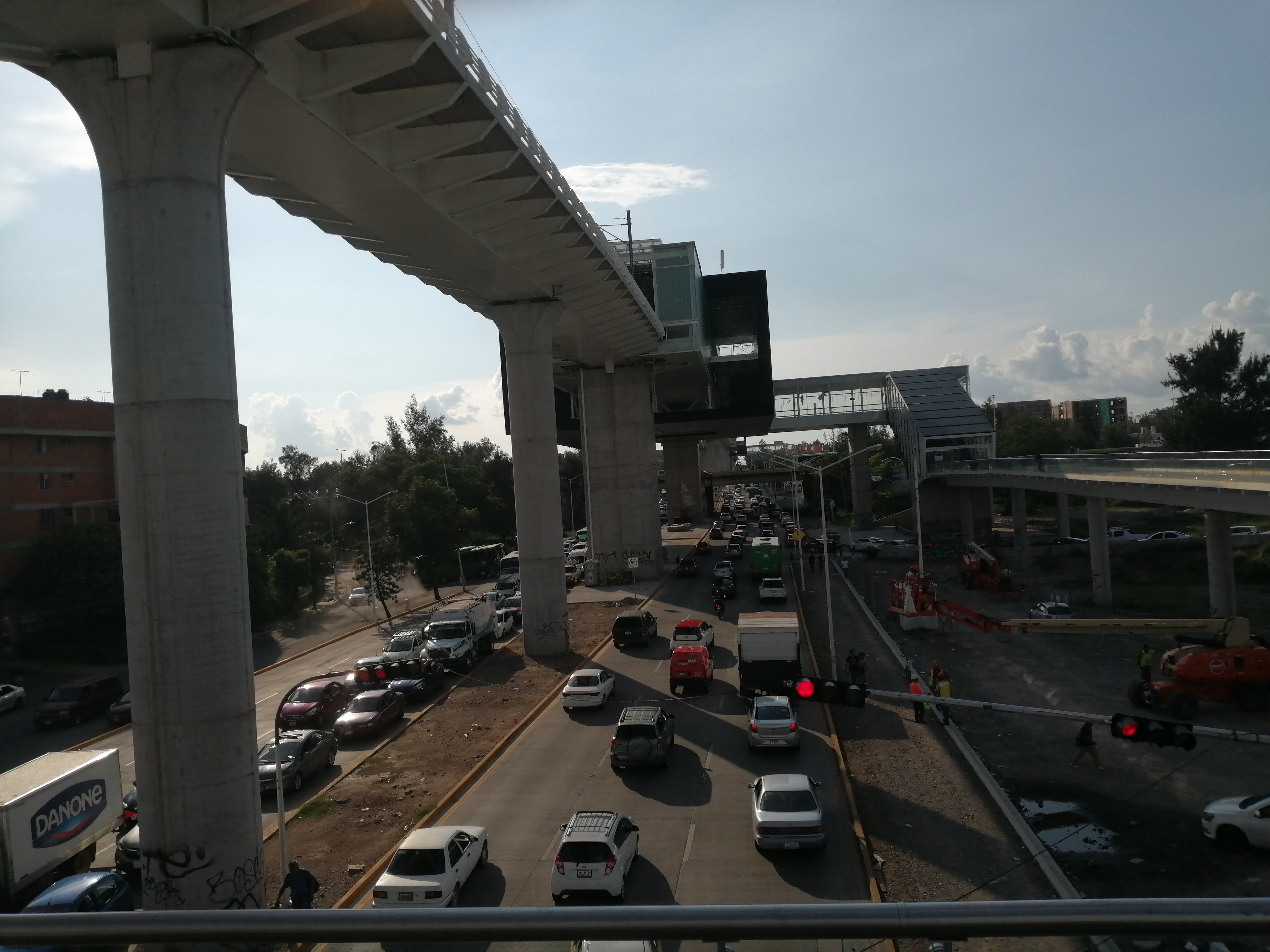 Carretera Tesistan.